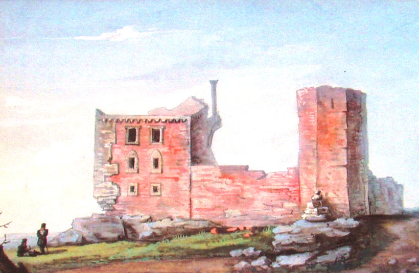 Widok nieistniejące zamku w Koninie zbudowanego przez króla Kazimierza Wielkiego w 2 połowie XIV wieku